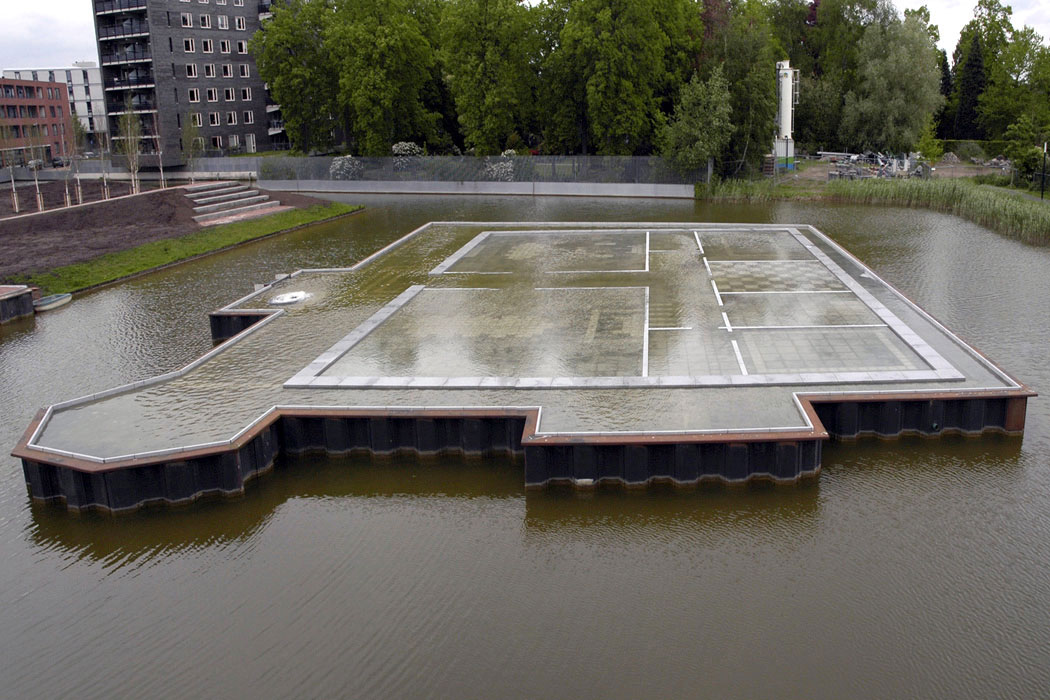 kunstwerk boven op de funderingsresten van Huys Hengelo